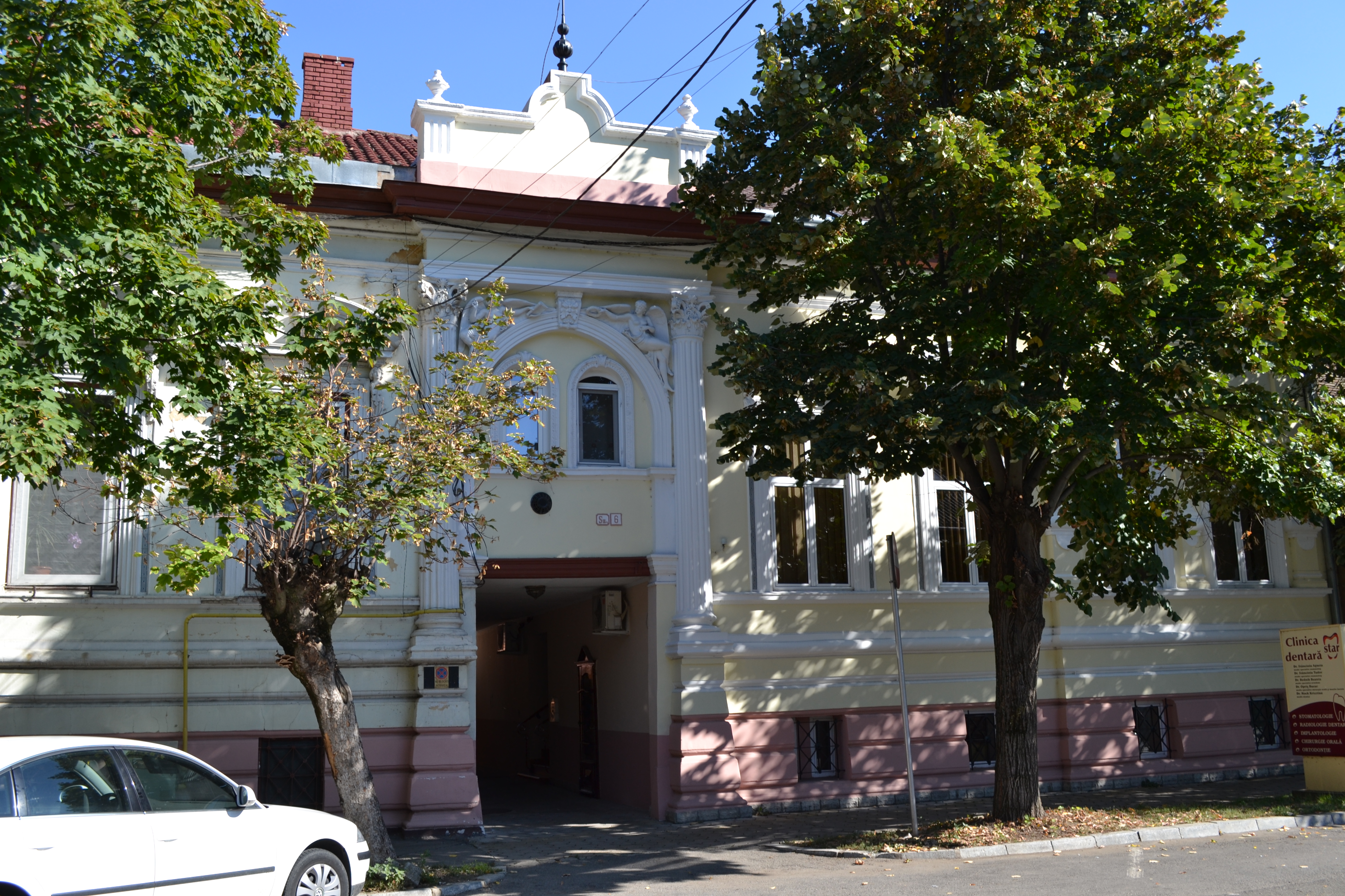 Casa Soós